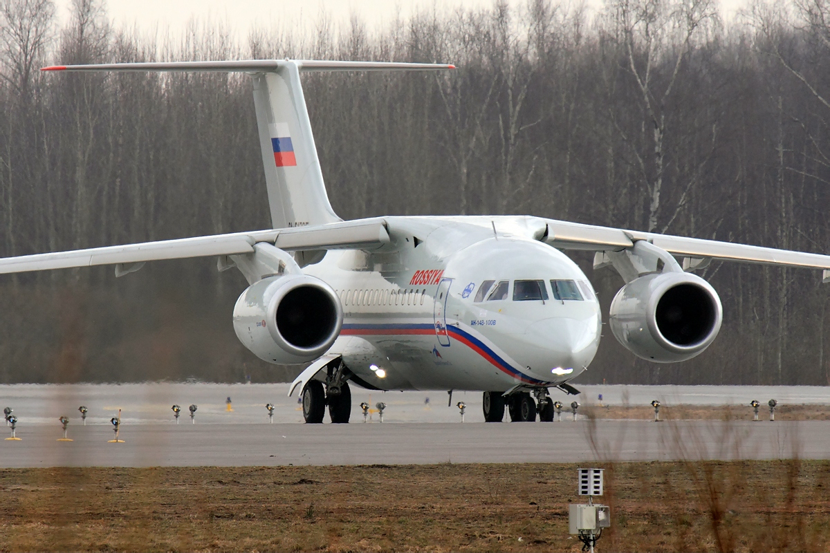 Rossiya Antonov An-148-100B